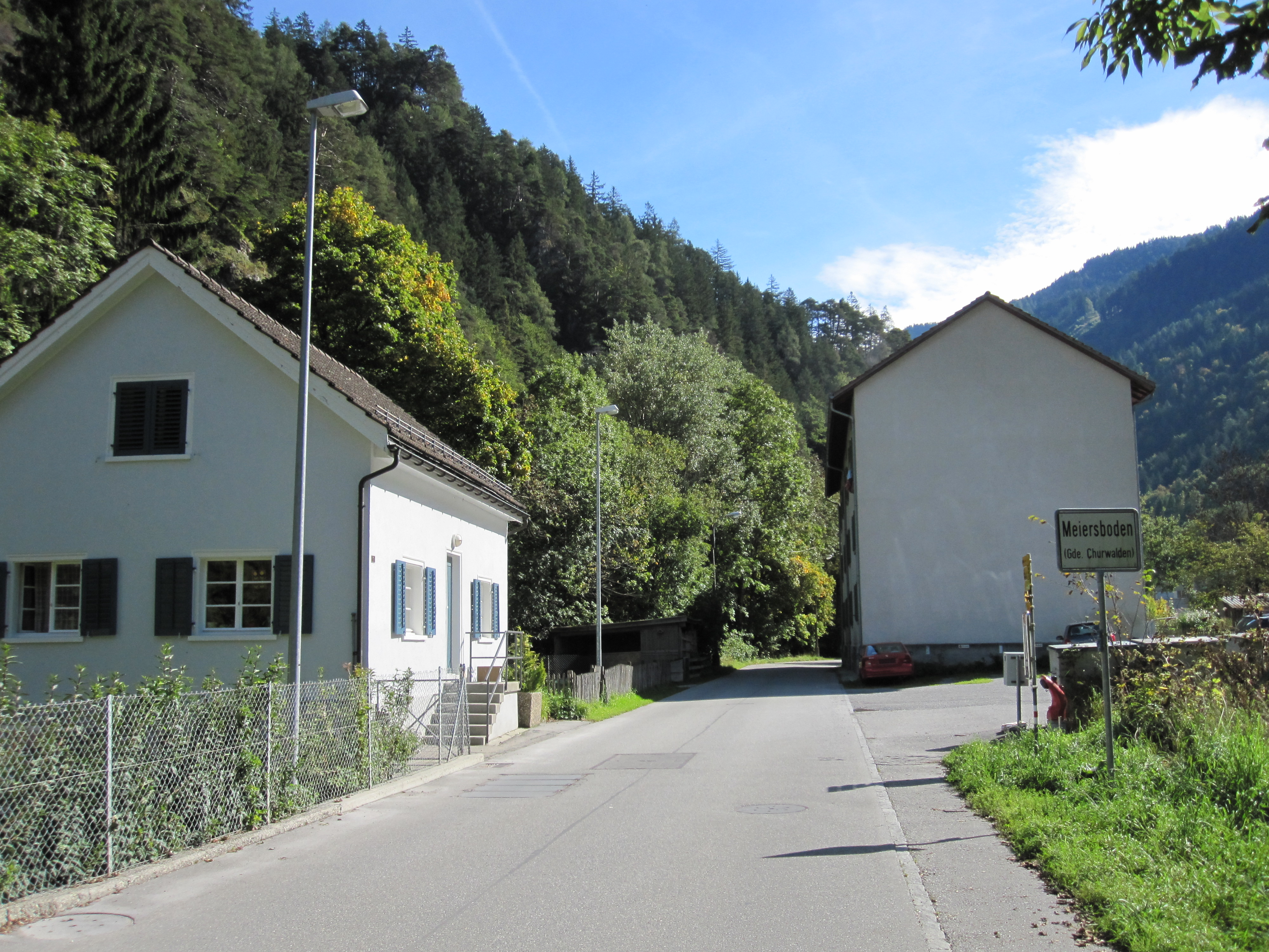 Ortseingang Meiersboden (politisch zu Churwalden gehörig, de facto Stadtquartier von Chur)